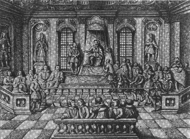 Zasedání Moravského zemského sněmu v Zemském domě v 17. století. Dobová freska